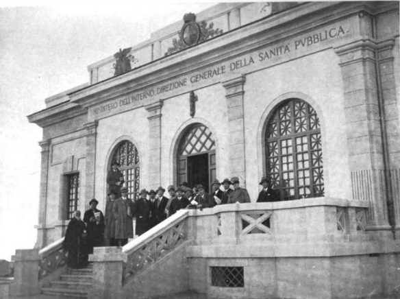 Ingresso della scuola di malariologia